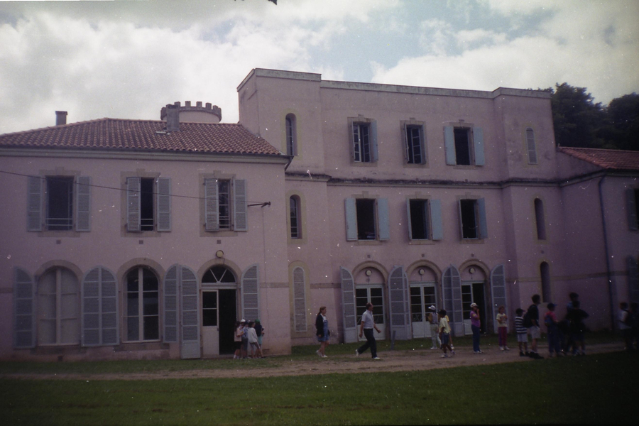 Nescus